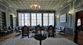 Аҧсшәа: inside Hindliyan